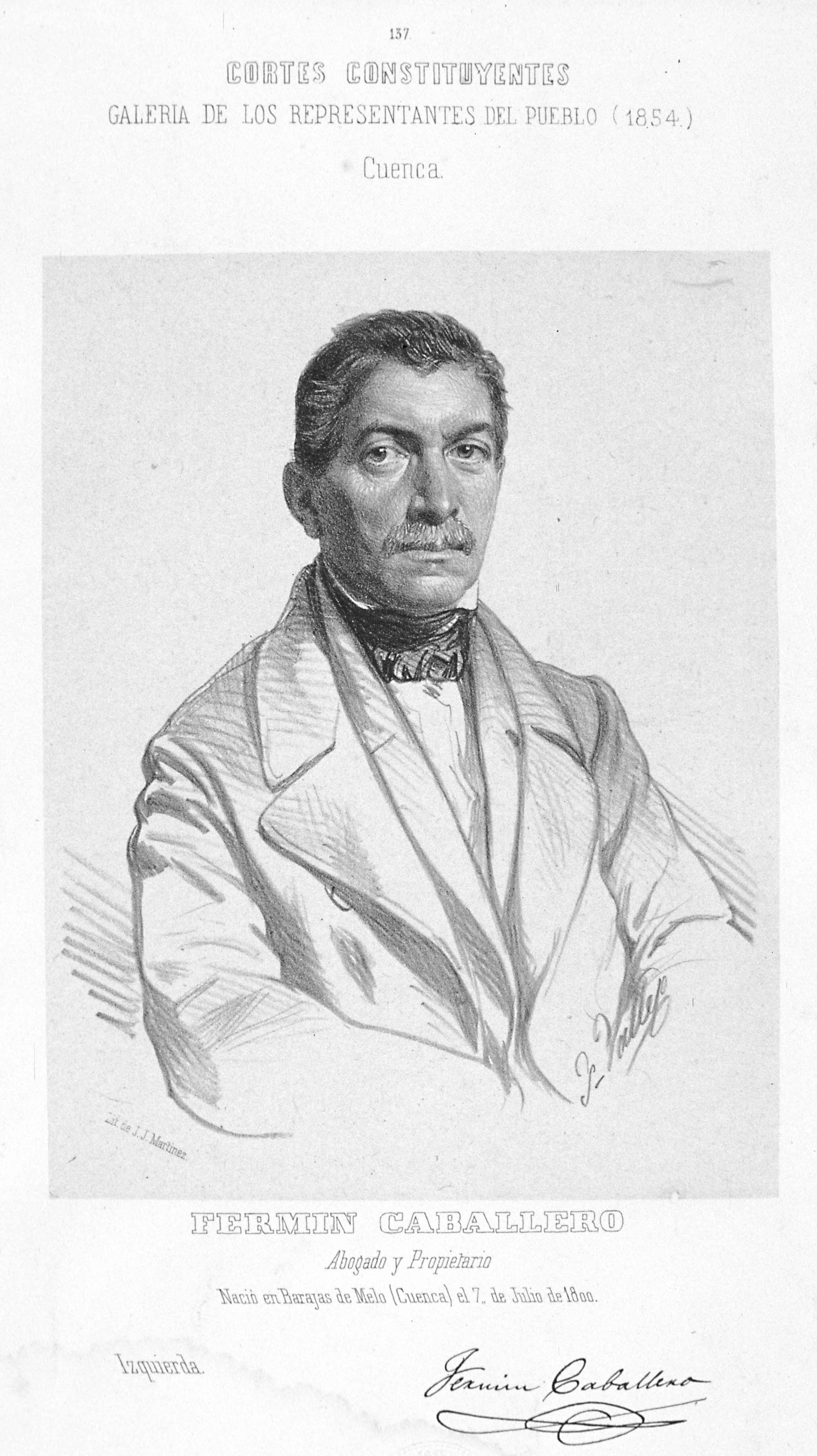 Grabado en blanco y negro del geógrafo, periodista, escritor, político y orador español Fermín Caballero (1800-1876).